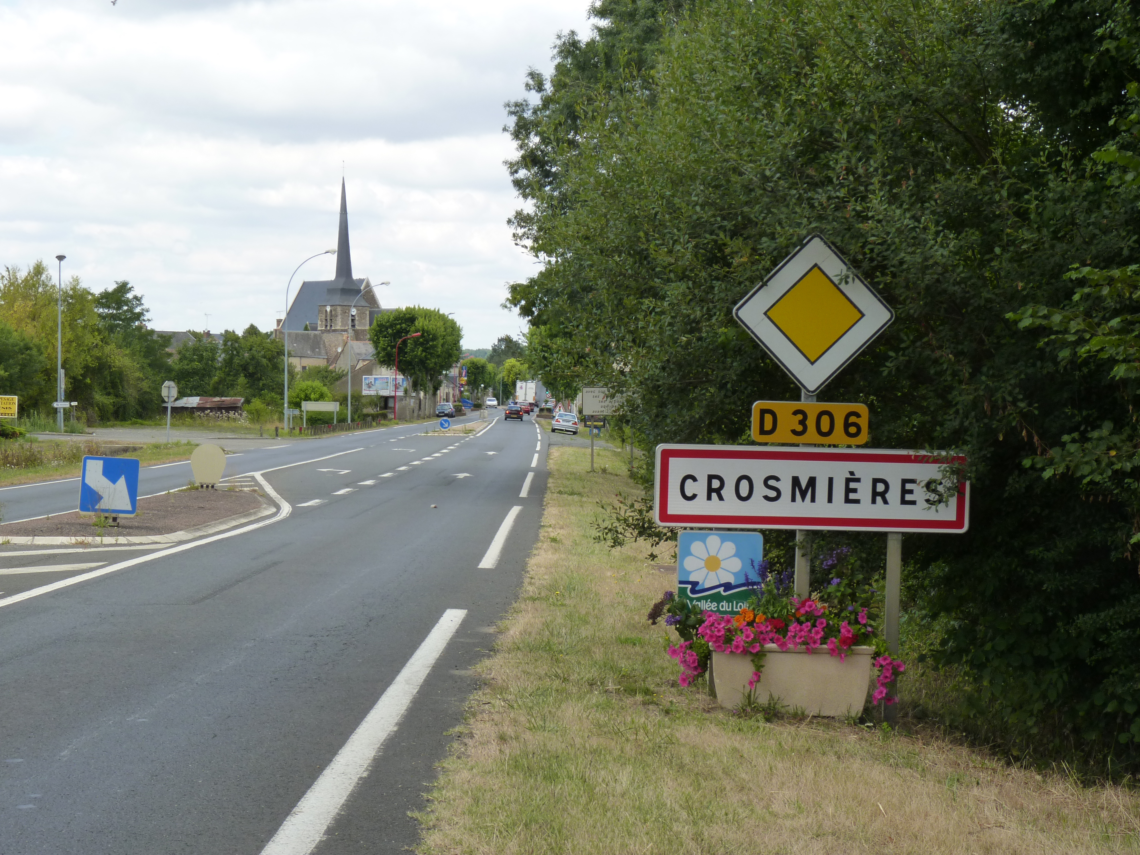 Sarthe - Crosmières - Entrée bourg de par La Flèche (D 306)